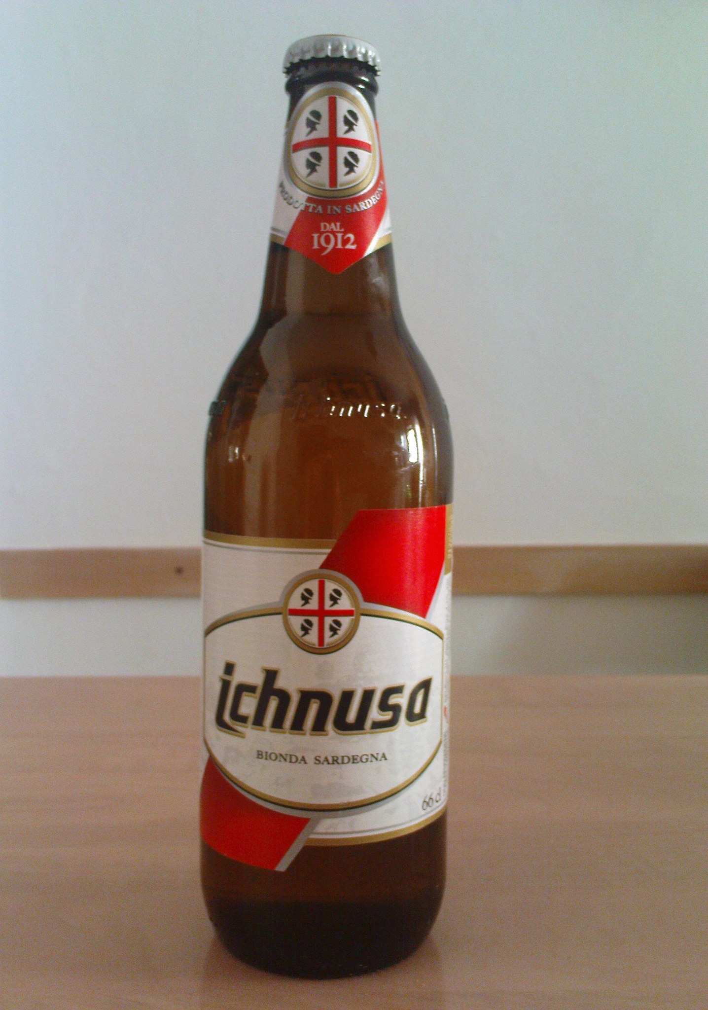 Bottiglia birra Ichnusa